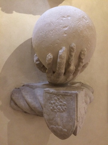 Fa parte degli unici due resti della statua colossale di Napoleone I, che si trovava sulla colonna dell'attuale Piazza Ariostea di Ferrara tra il 1810 e il 1814.